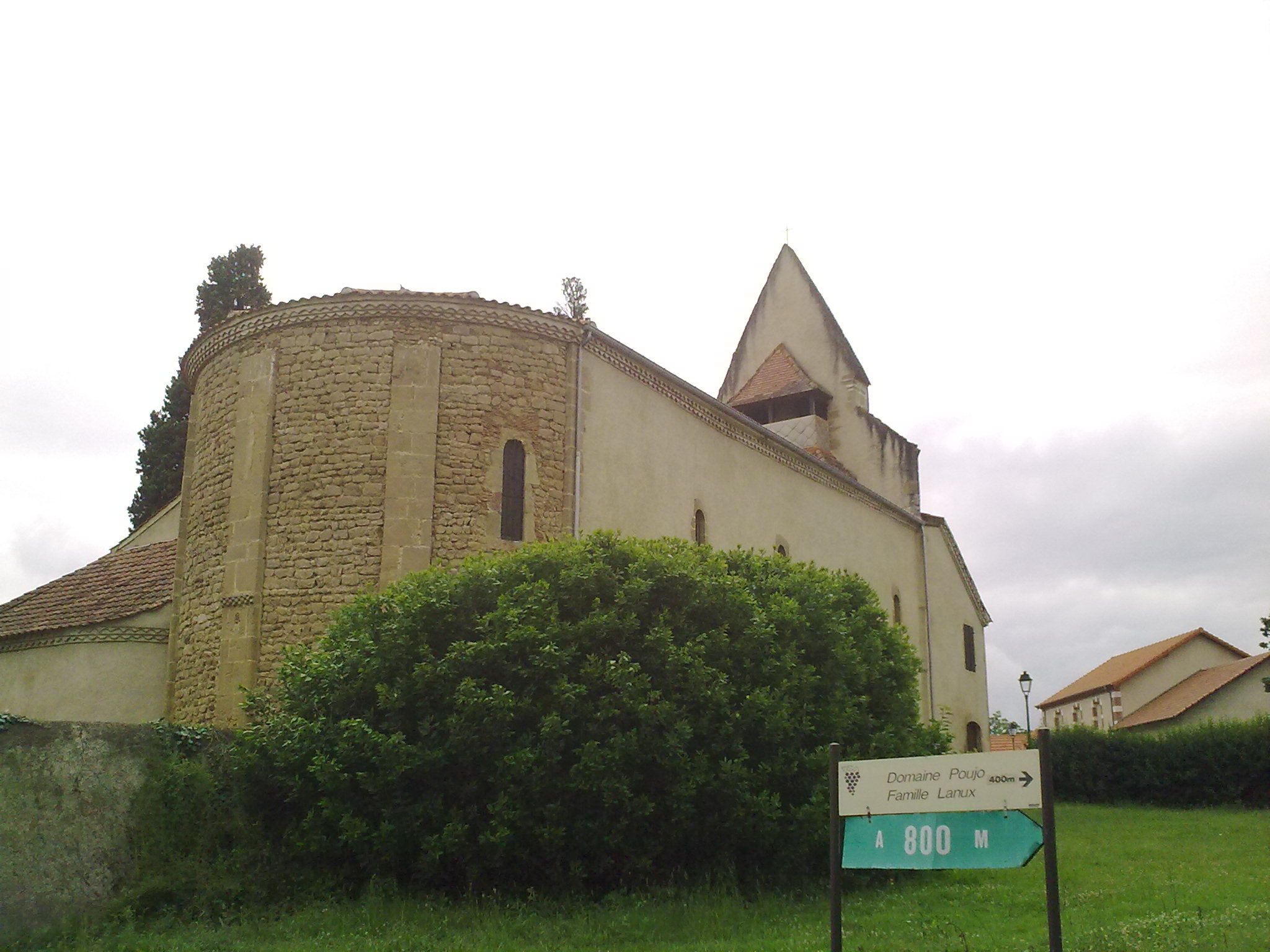 Aydie